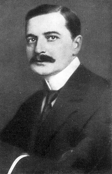 Huszka Jenő magyar zeneszerző.